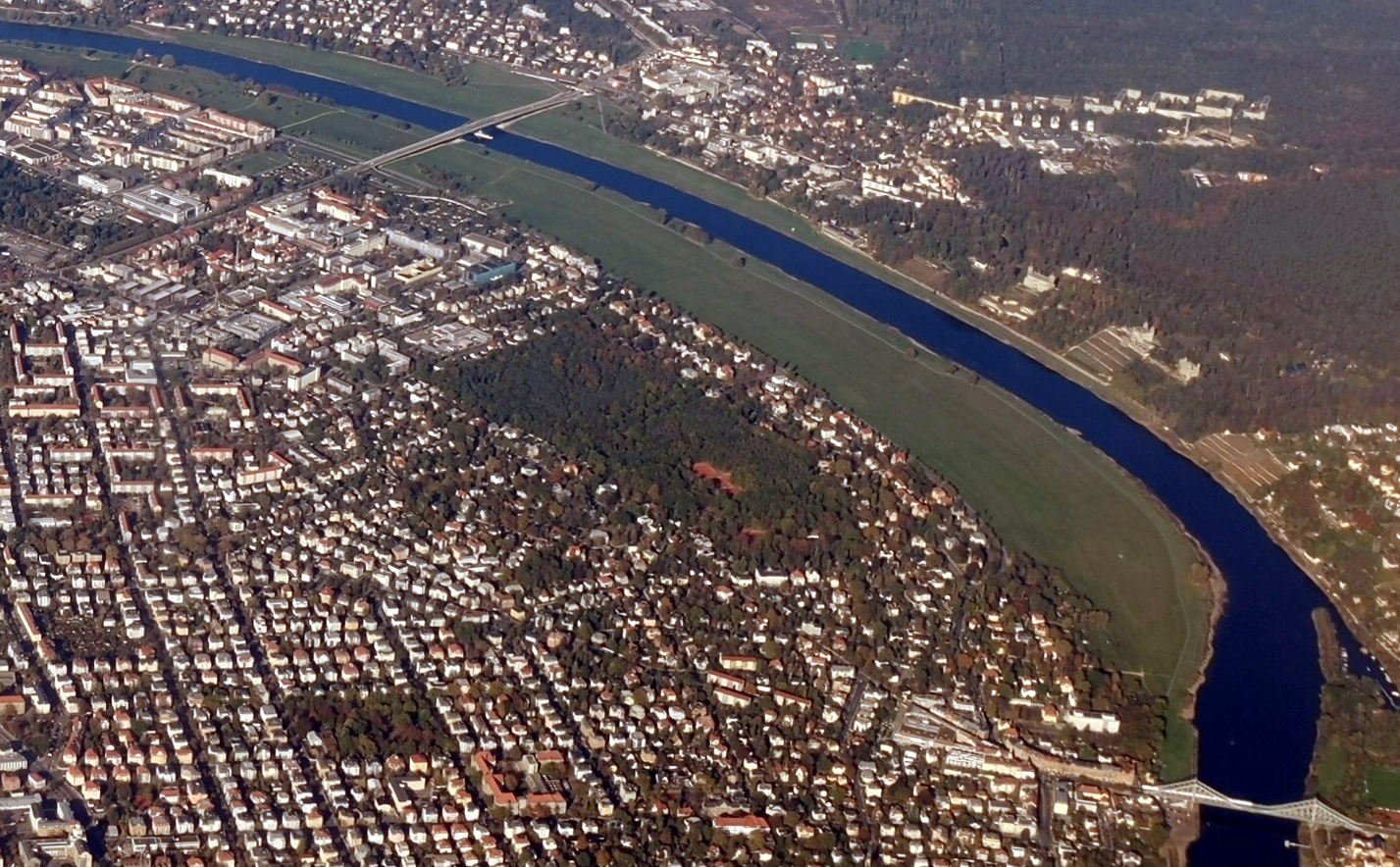 Dresden aus dem Flugzeug gesehen